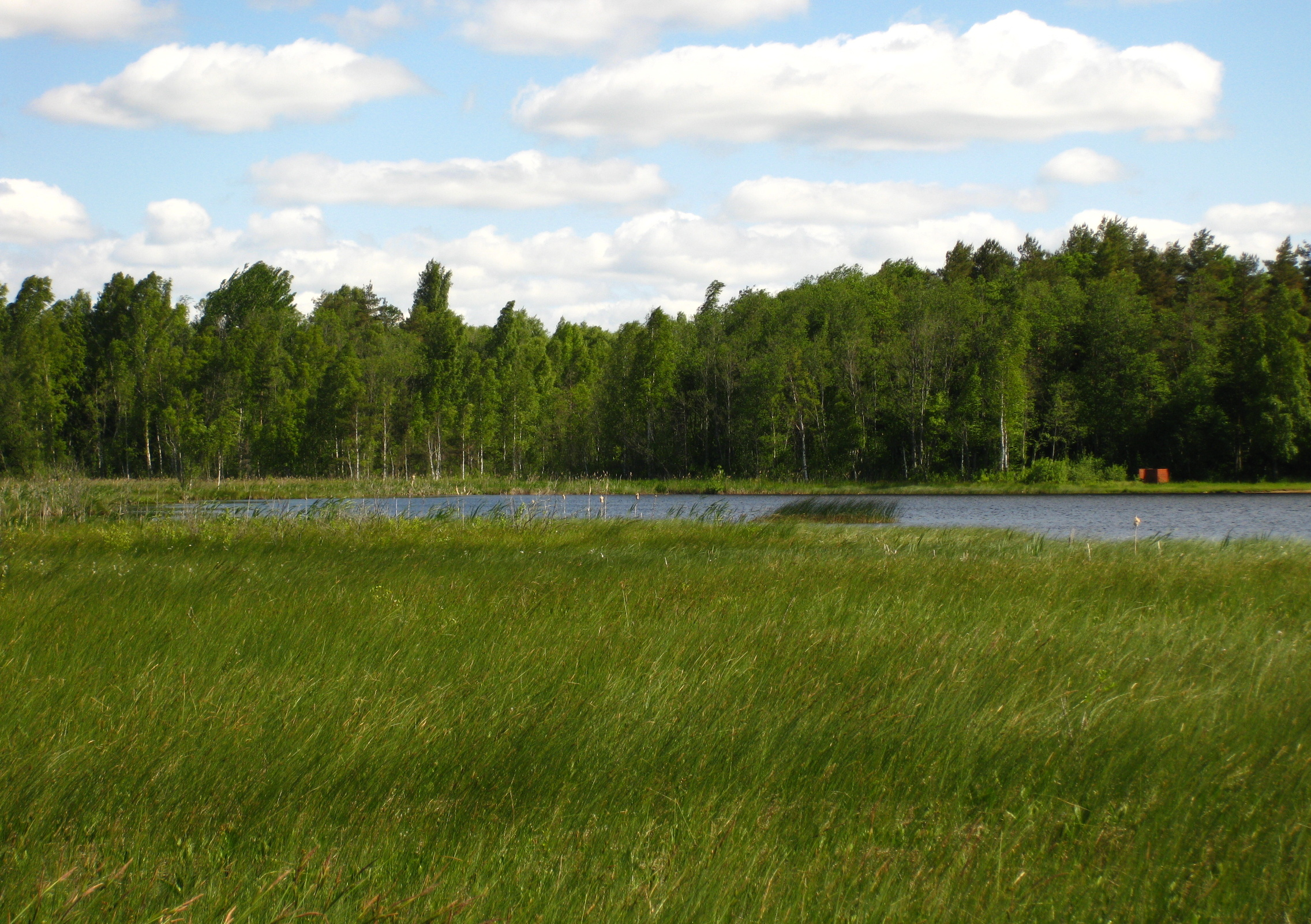 Imsi järv